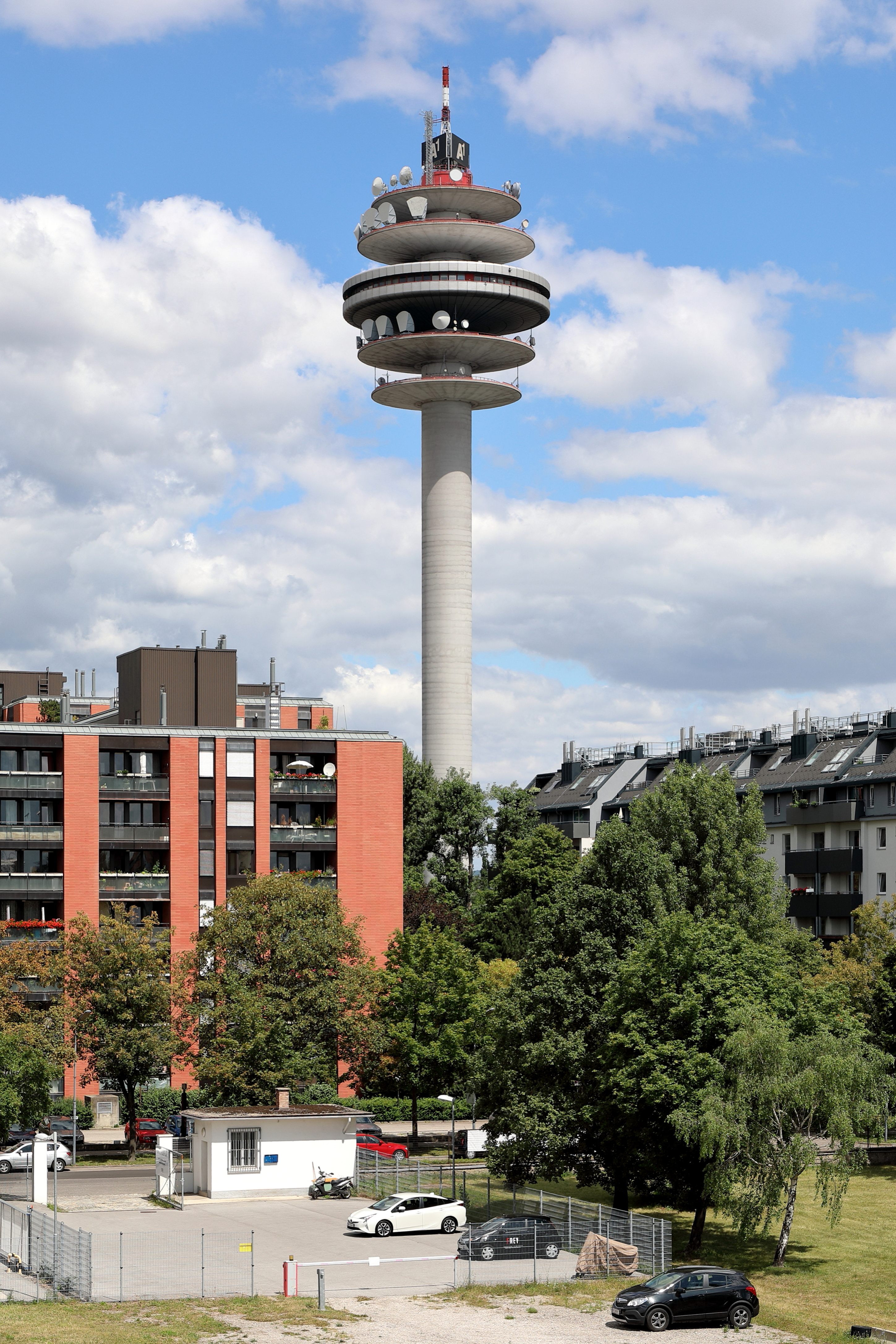 Der Richtfunkturm des Fernmeldezentrums Arsenal der A1 Telekom Austria an der Adresse Arsenal 22 im 3. Wiener Gemeindebezirk Landstraße.Der Turm, früher auch als Postturm bezeichnet, wurde nach Plänen des Architekten Kurt Eckel und des Statikers Robert Krapfenbauer im Zuge der Errichtung eines Fernmeldezentrums gebaut und 1978 offiziell in Betrieb genommen. Er hat eine Gesamthöhe von 155 m, davon einen 136,6 m hohen Stahlbetonschaft und eine 18,4 m hohe Stahlantenne.